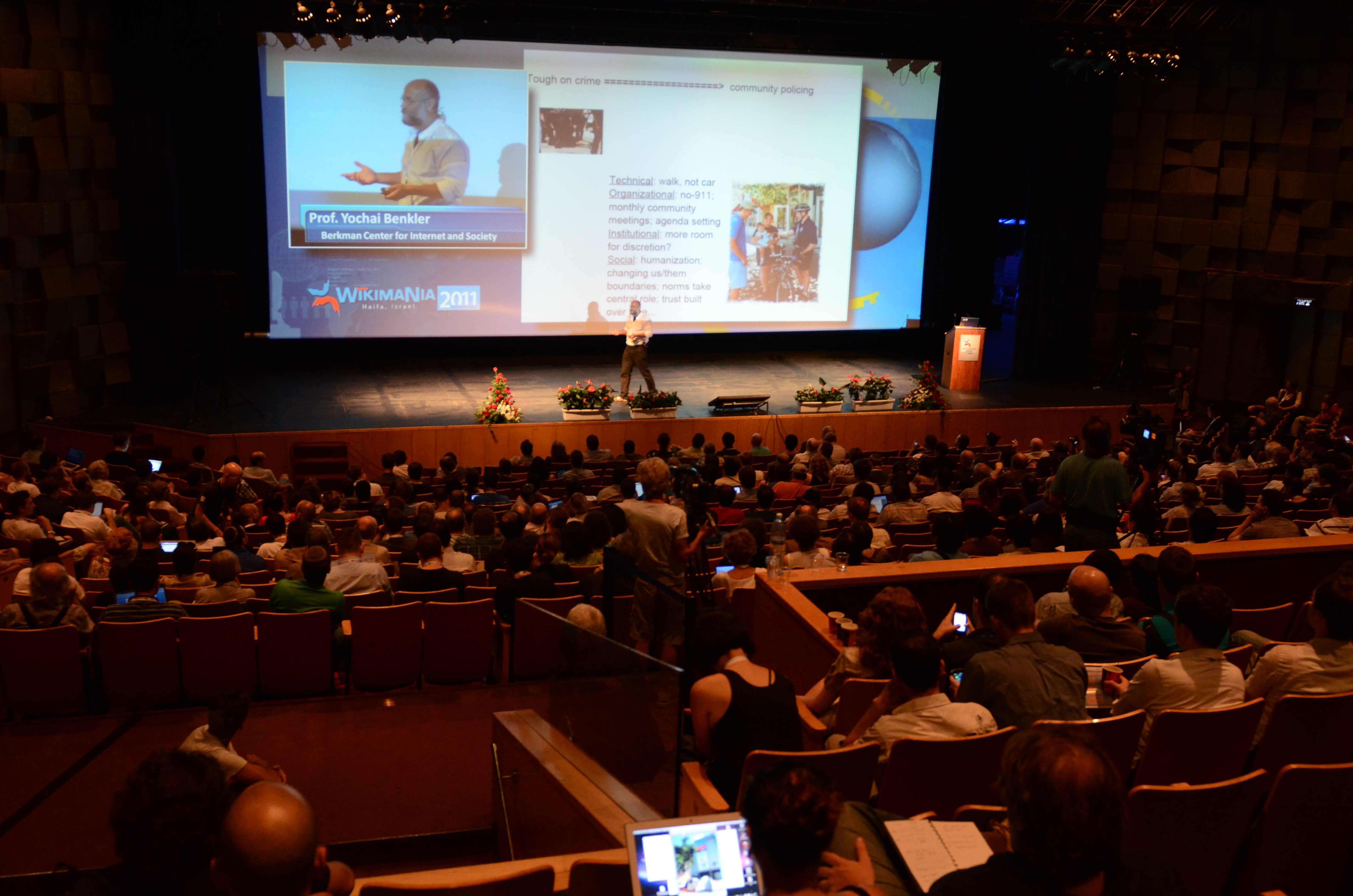 Wikimania 2011 - opening ceremony